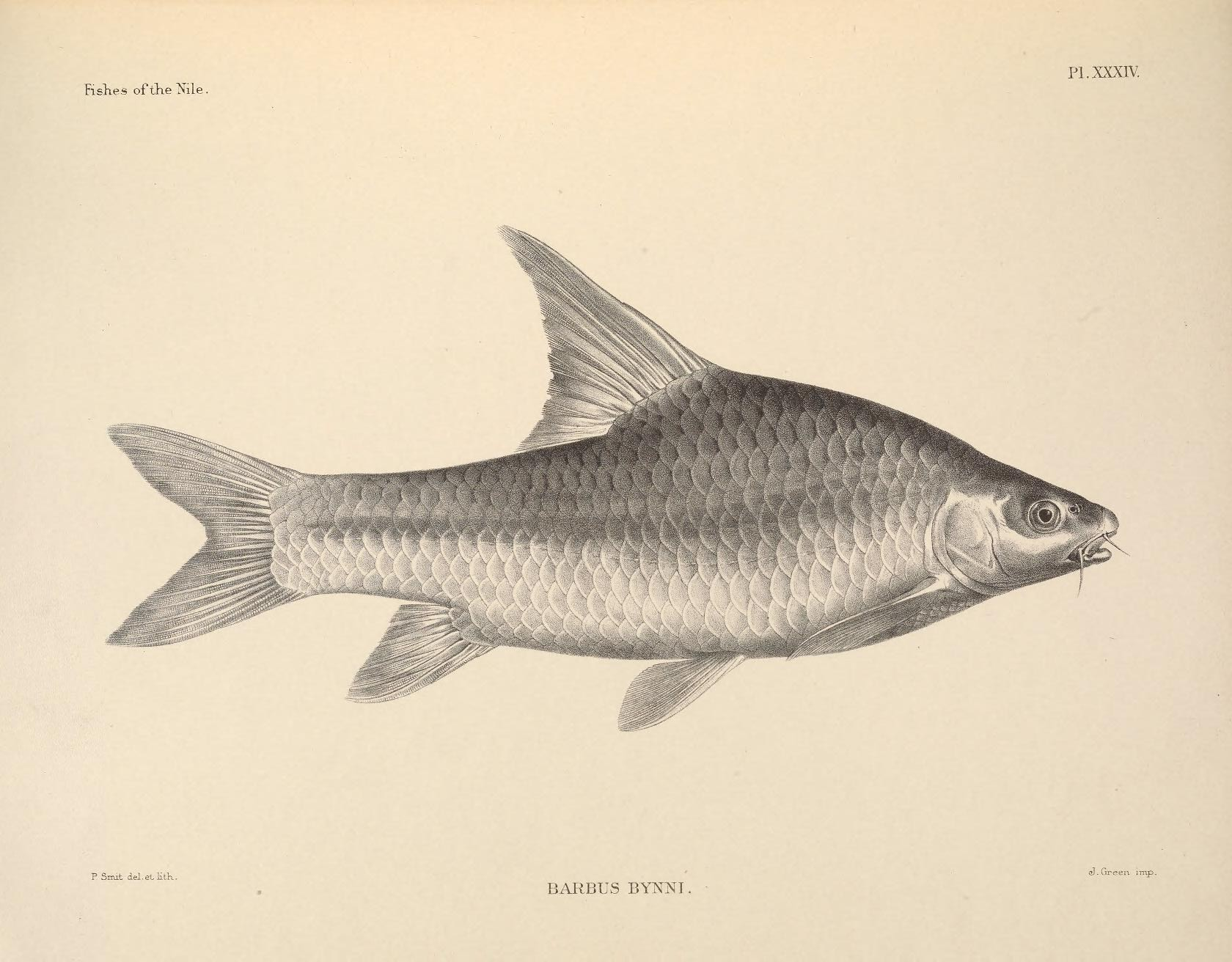 .: 5 CO P CQ m o 0)